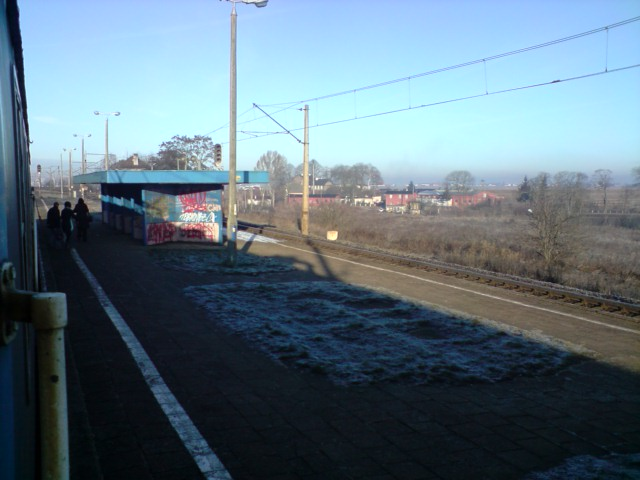 Peron w Lisewie